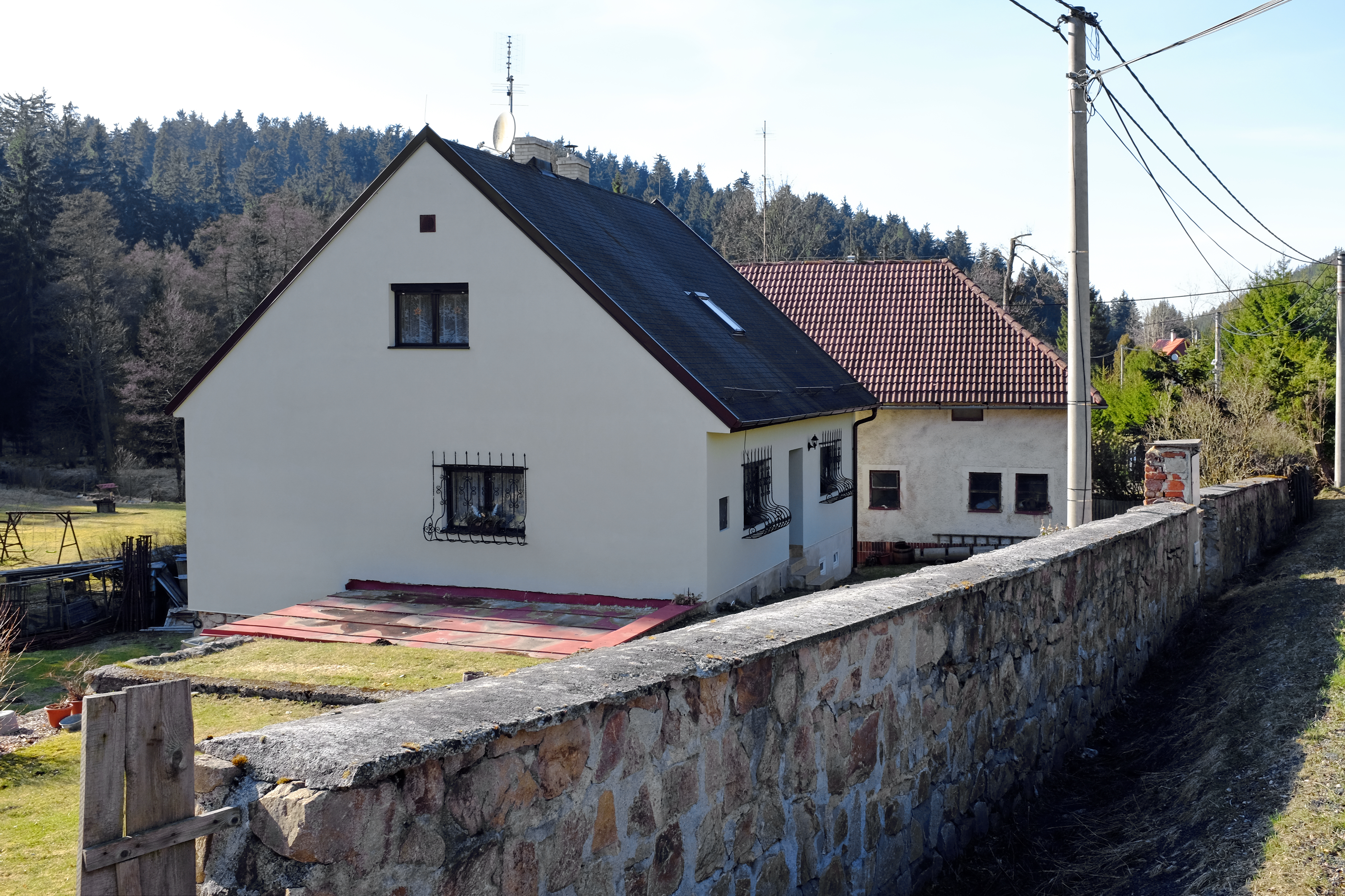 Osada Podstrání, chalupa na místě bývalého Schimmerova mlýna na Lobezském potoce, Slavkovský les, okres Sokolov